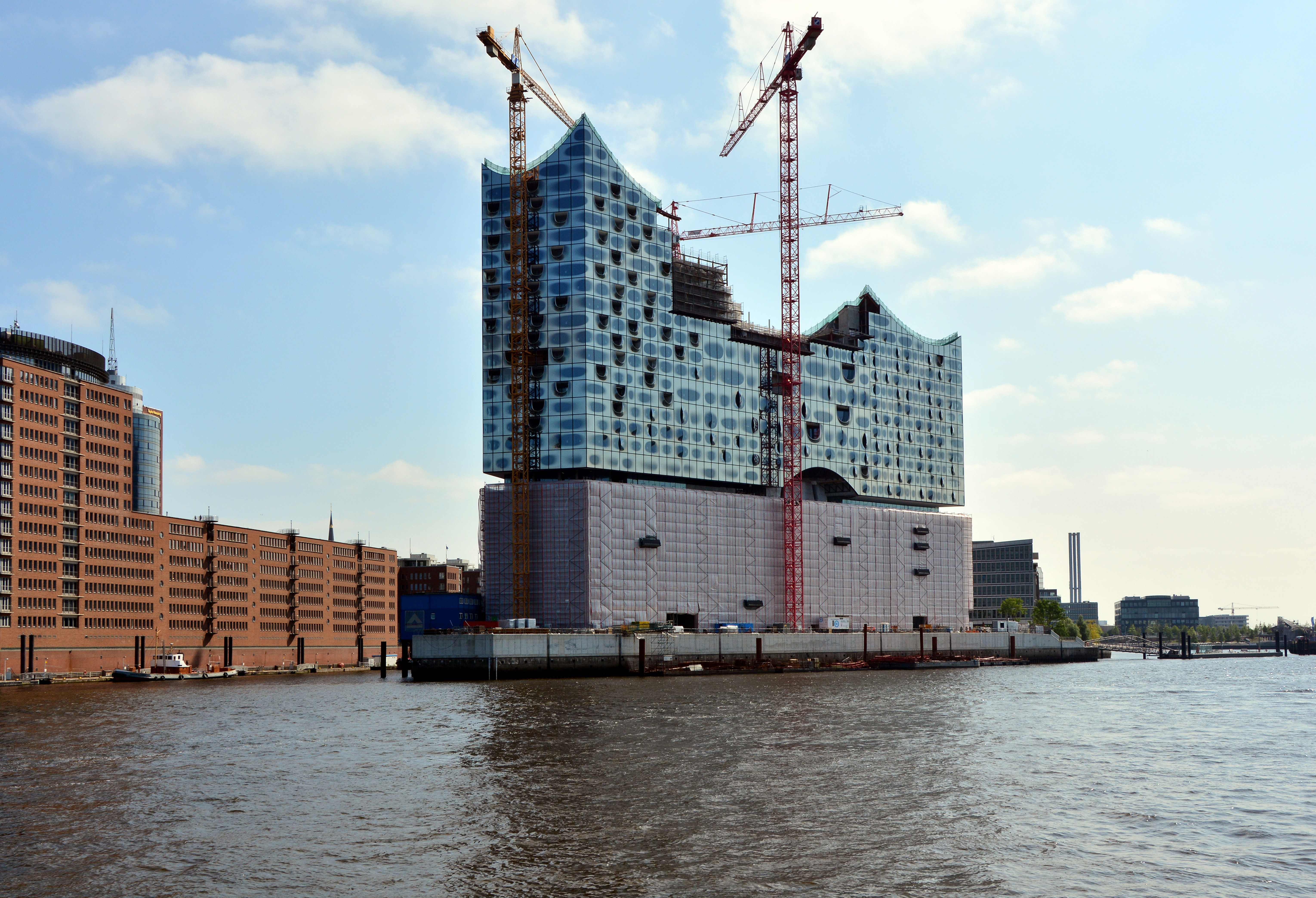 Die Elbphilharmonie in Hamburg, Juli 2013